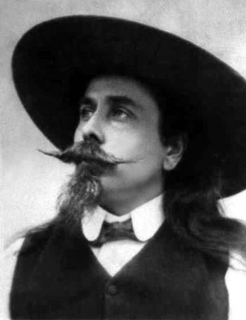 Portrait Samuel Franklin Cody, der fälschlicherweise oft für "Buffalo Bill" gehalten wurde und wird.